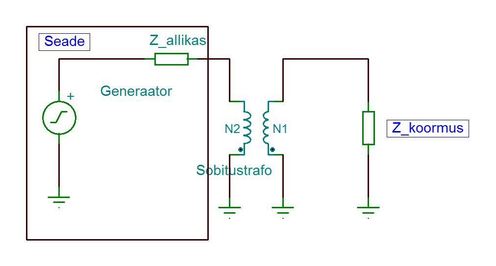 Sobitamine trafoga. Tehtud TinaSpice'i abiga.